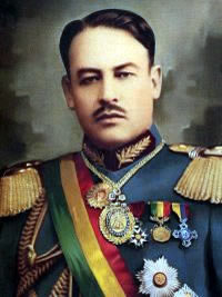 Ex presidente Carlos Blanco Galindo